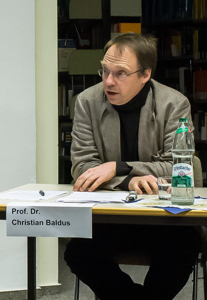 Prof. Dr. Christian Baldus bei einer Podiumsdiskussion